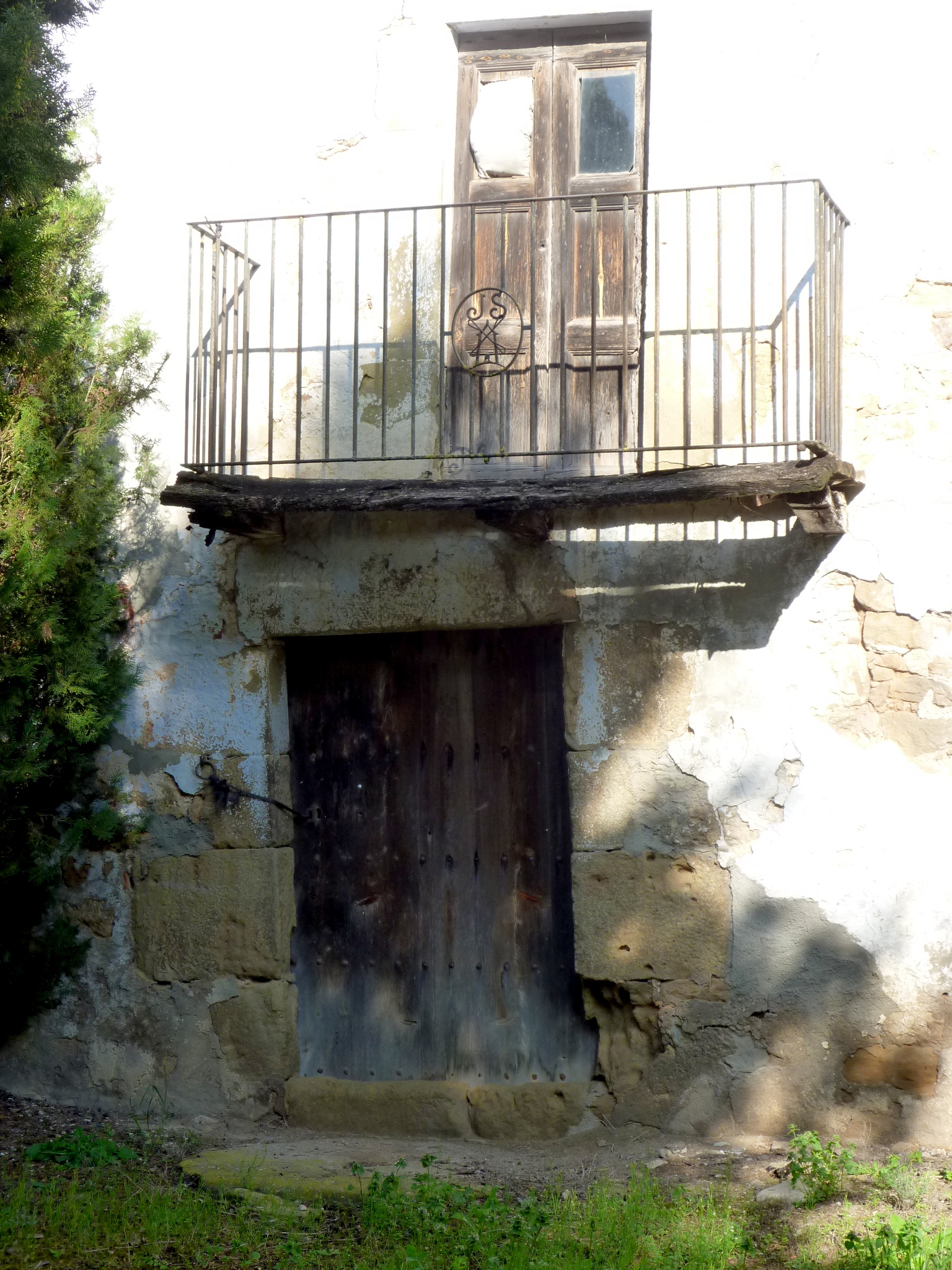 Casa del Molí Nou (la Baronia de Rialb): porta d'entrada